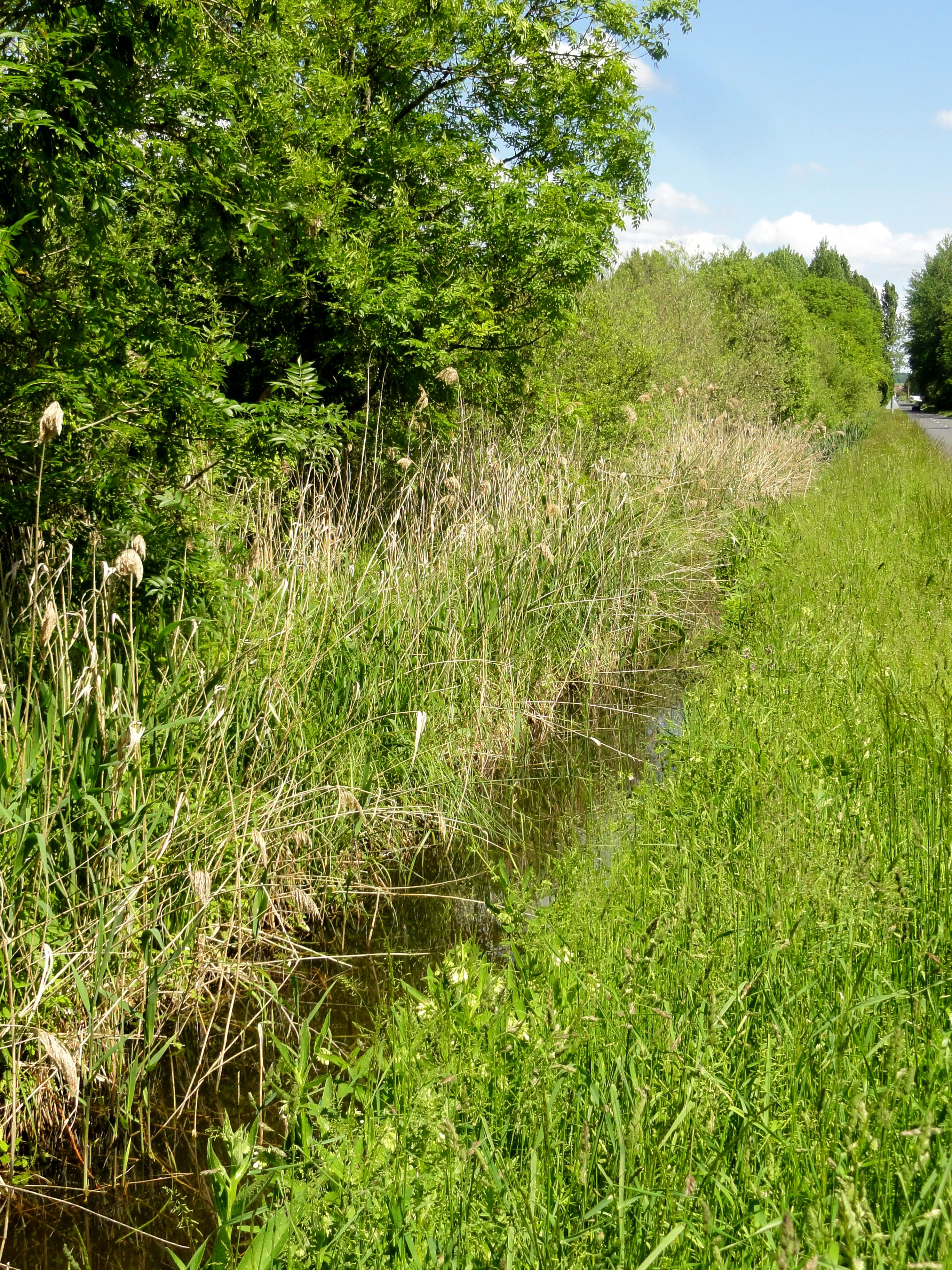 Marais de Sacy, près de la RD 75.